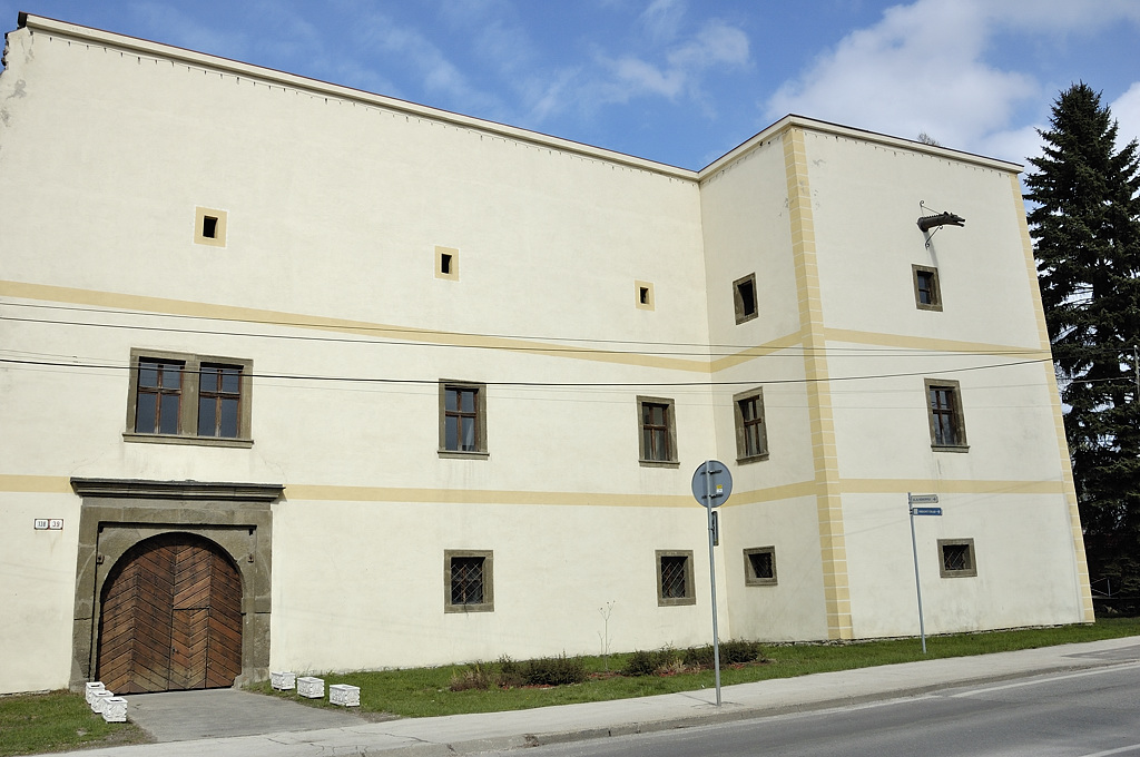 Zemianske Kostoľany, manor house